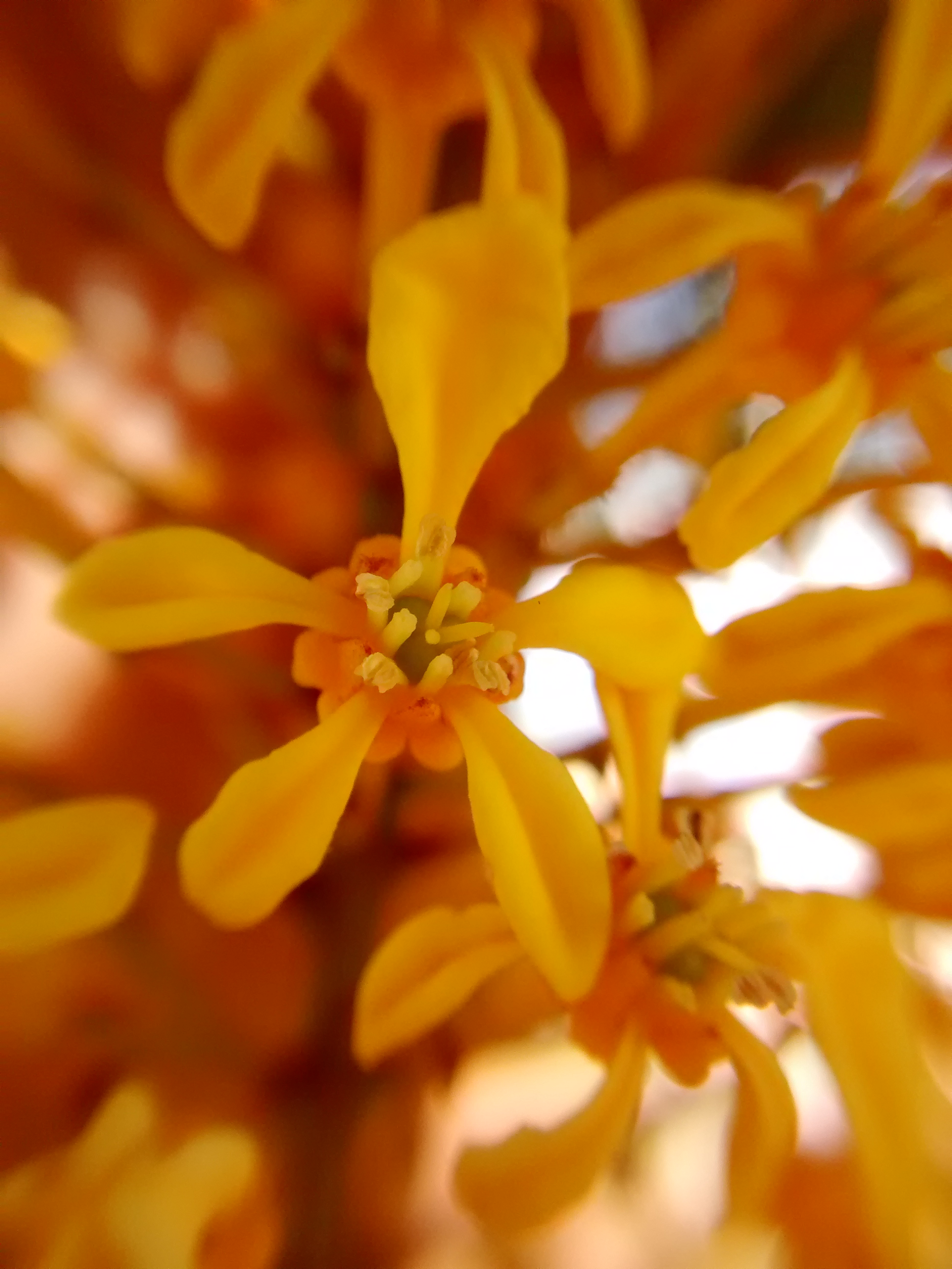 Flor de Lophanthera lactescens.